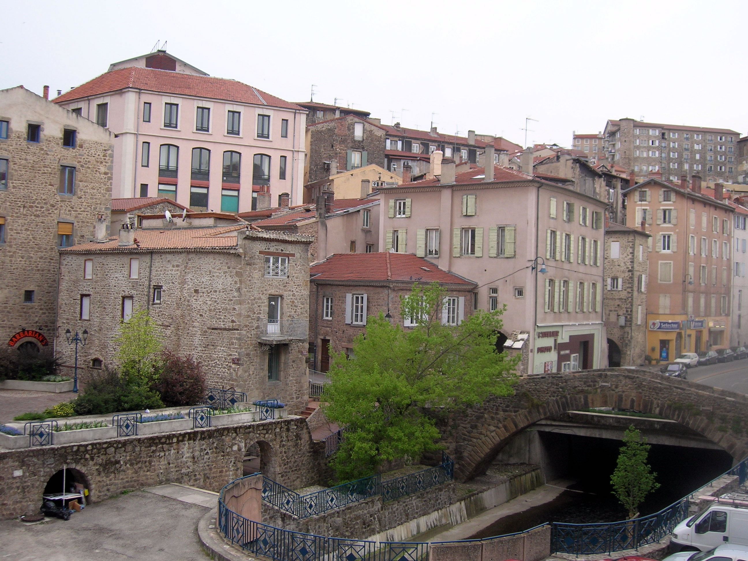 A gauche, une partie de la place de la mure. A droite le pont Valgelas traverse la rivière Deume couverte pour des besoins d'urbanisme et aussi car l'eau rejetée par les usines de papiers la rendait de piètre qualité, prix a payer jadis pour le développement économique de la ville. Un peu au dessus du milieu du pont, on distingue à peine les voutes soubises. Derrière l'arbre au centre la rue Valgelas monte place de la liberté. En haut à droite, le couvent Sainte Marie, aujourd'hui rénové en habitation.